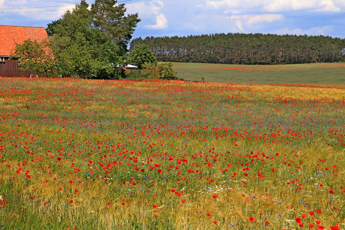 Klatschmohn in einem Mecklenburger Gerstenfeld